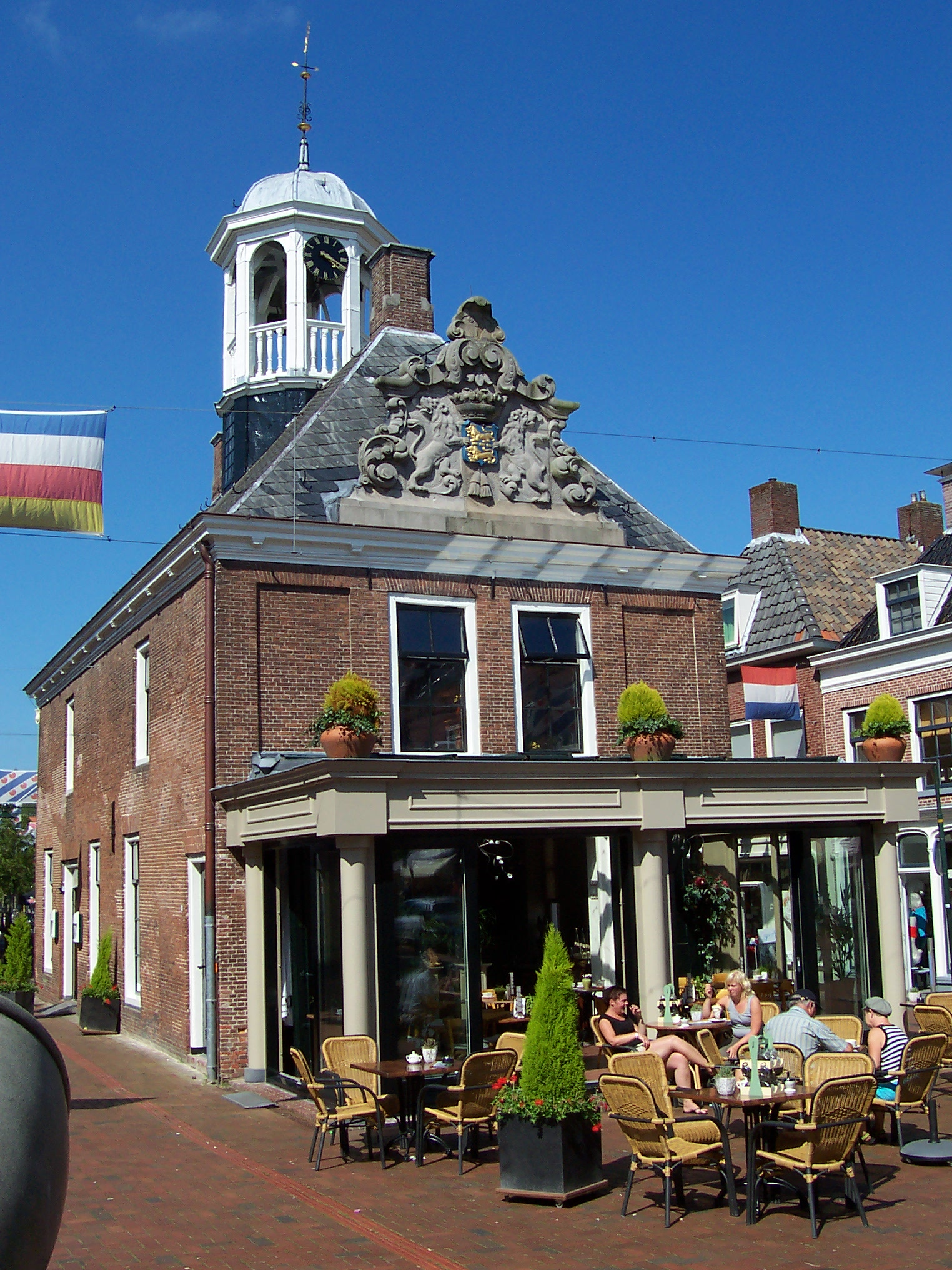 Dokkum, Stadtwaage